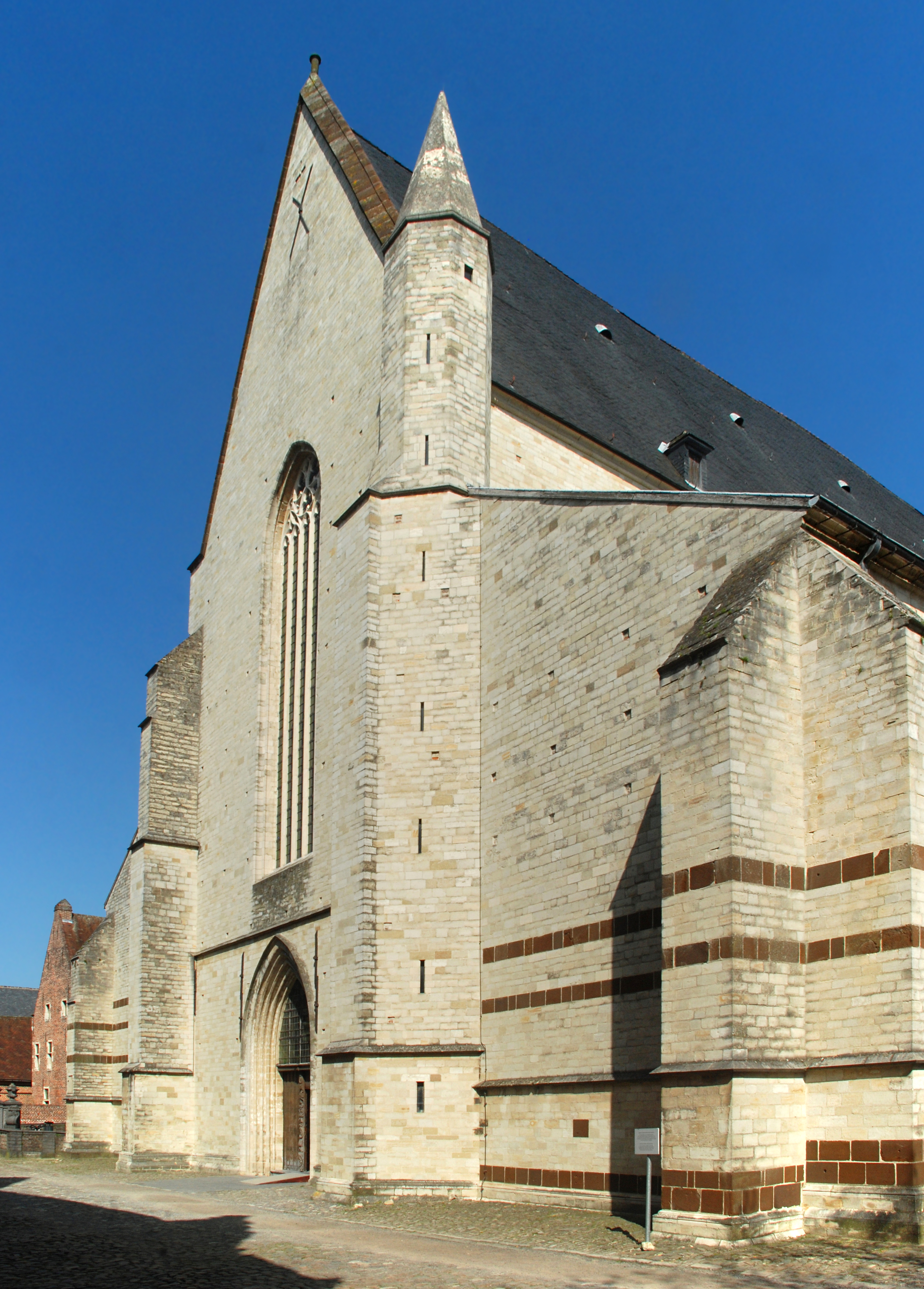 Belgique - Louvain - Église Saint-Jean-Baptiste-du-Béguinage